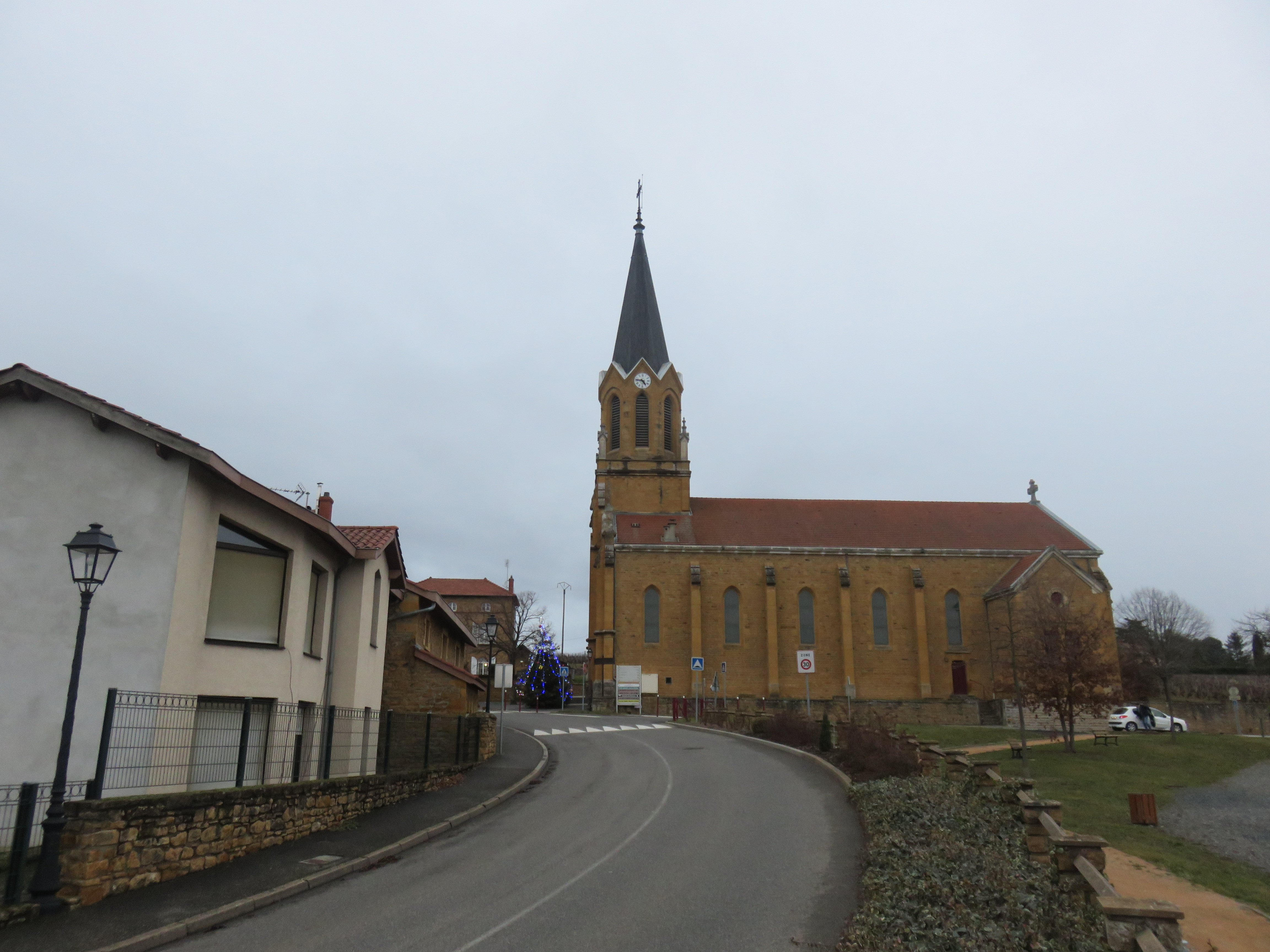 Route départementale 19 et église Saint-Germain de Saint-Germain-sur-l'Arbresle (commune de Saint-Germain-Nuelles, Rhône, France).